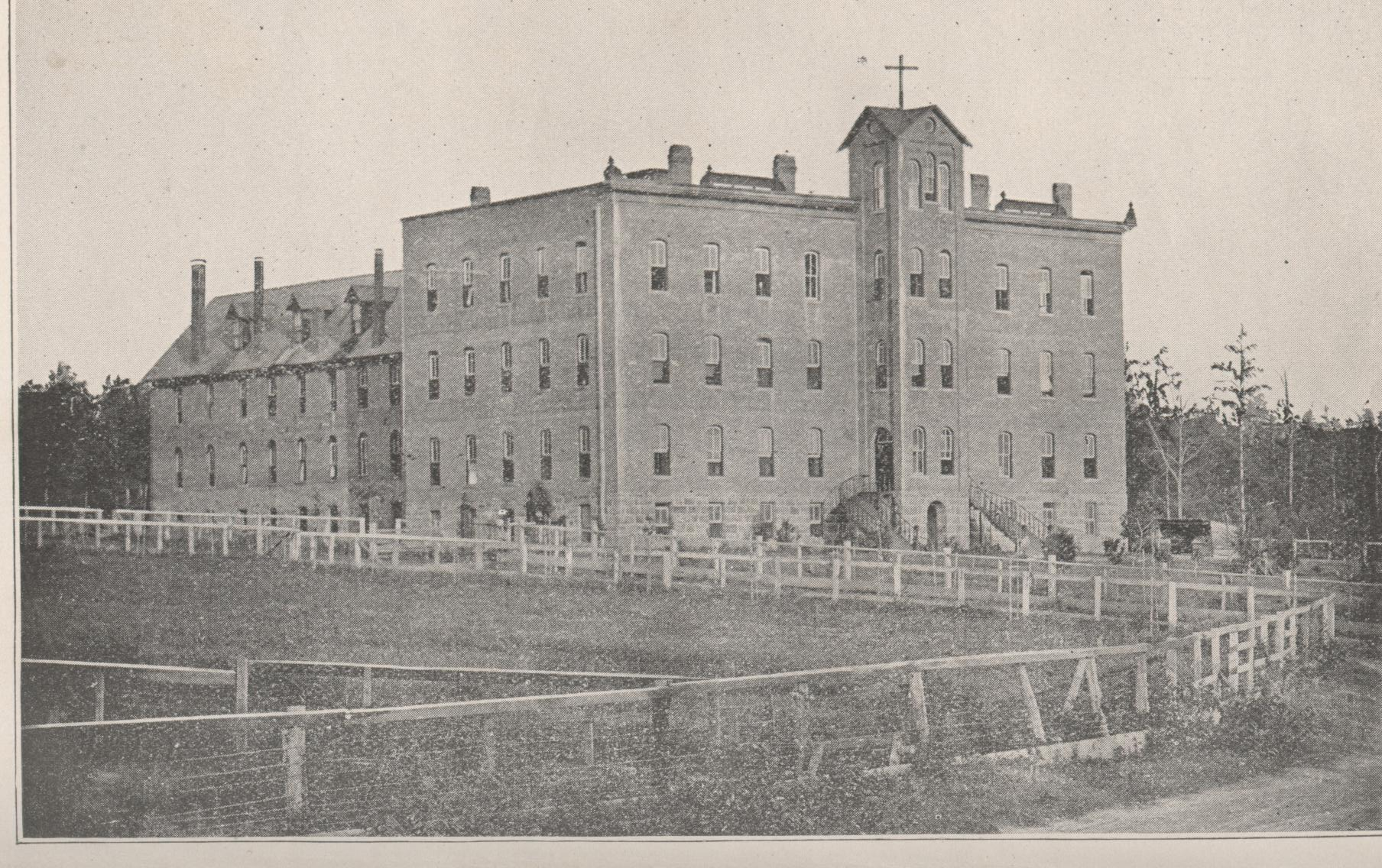 Abtei St. Bernhard Culman, Alabama, USA.